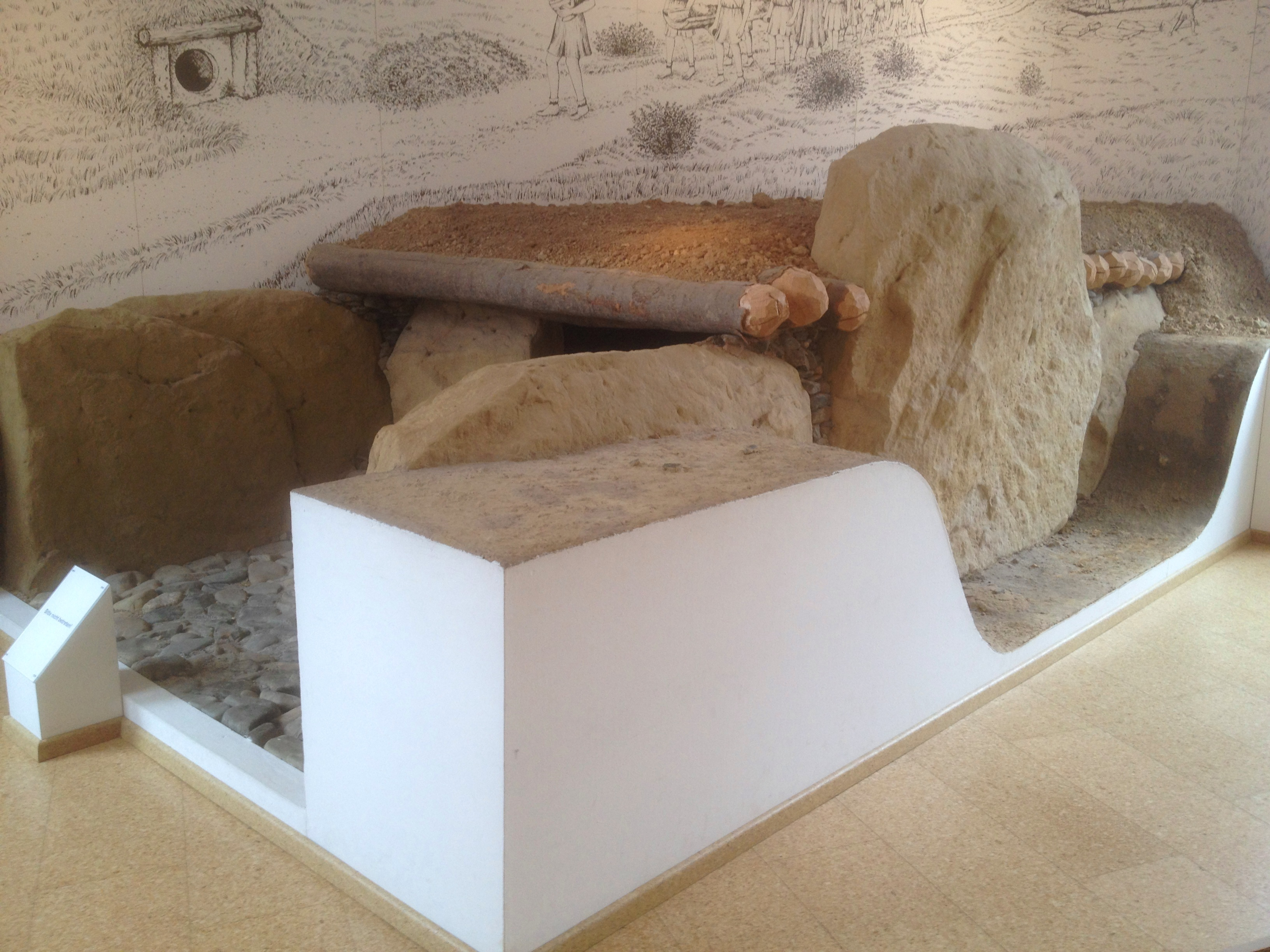 Braunschweigisches Landesmuseum - Kanzlei Wolfenbüttel: Rekonstruktion des Galeriegrabs Bredelem